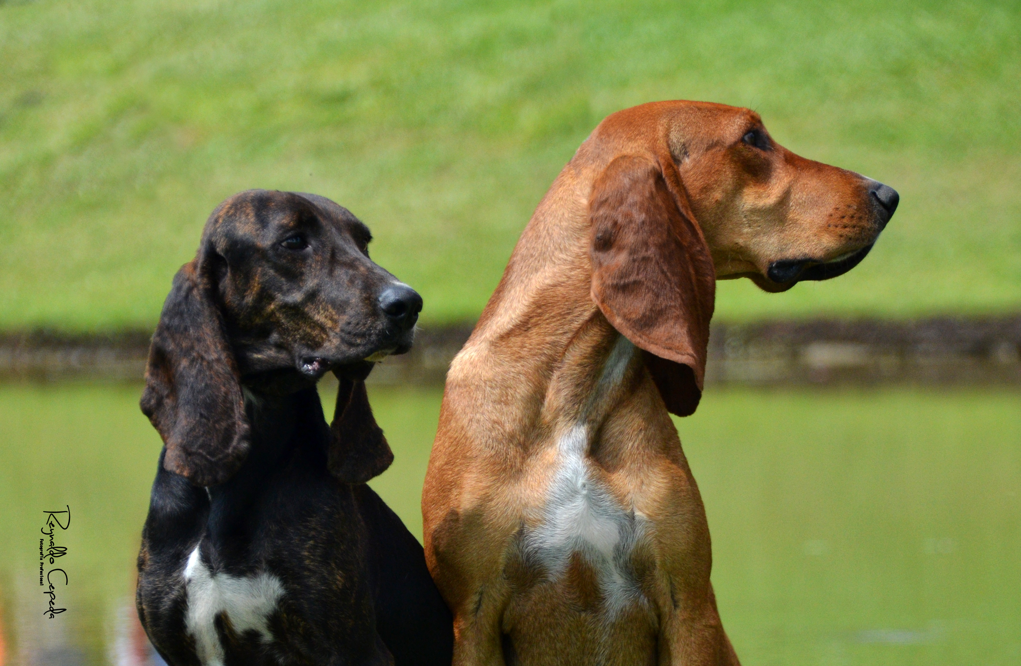 cabezas tipicas de la raza